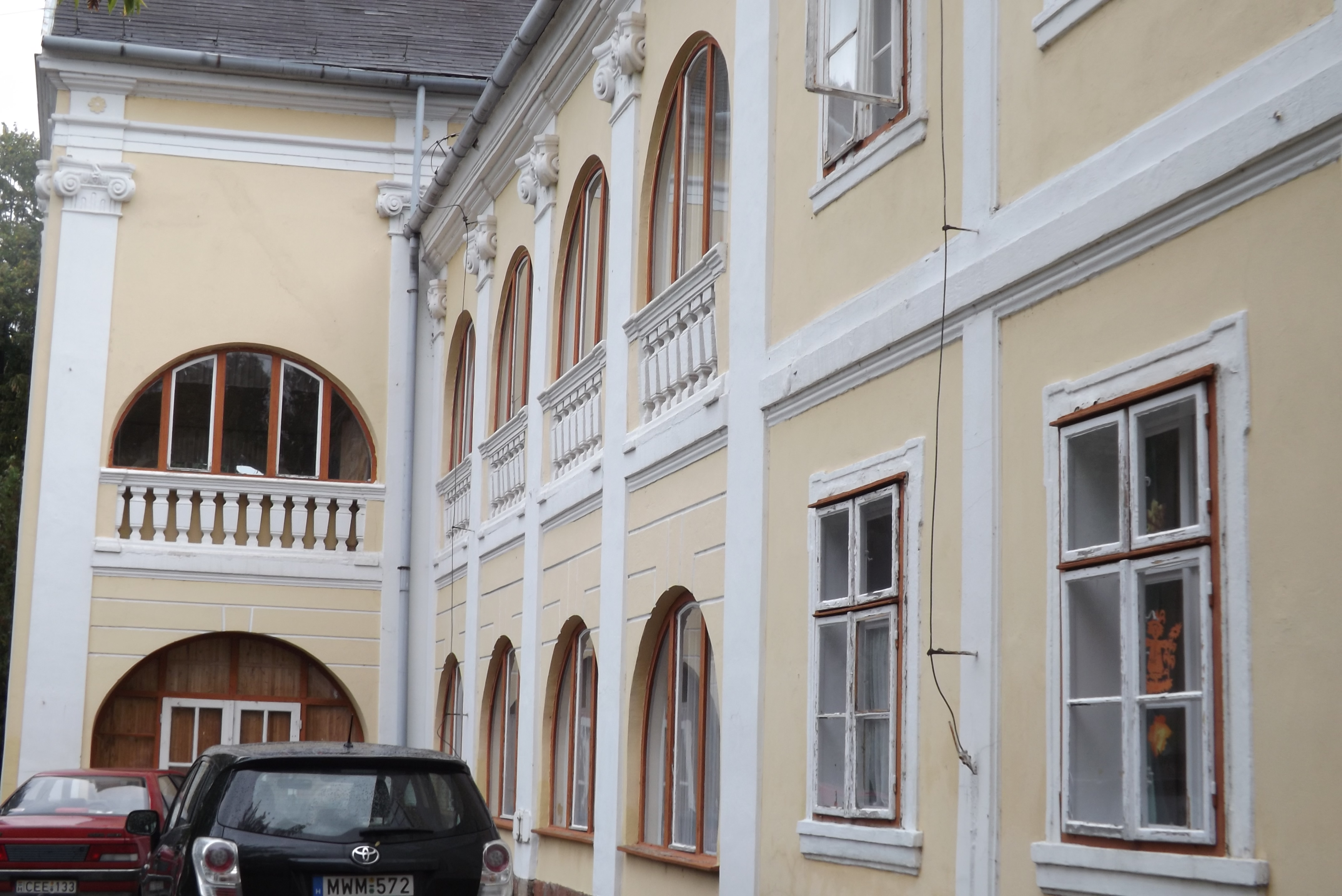 Az Eötvös–Gorove-kastély részlete Sályon